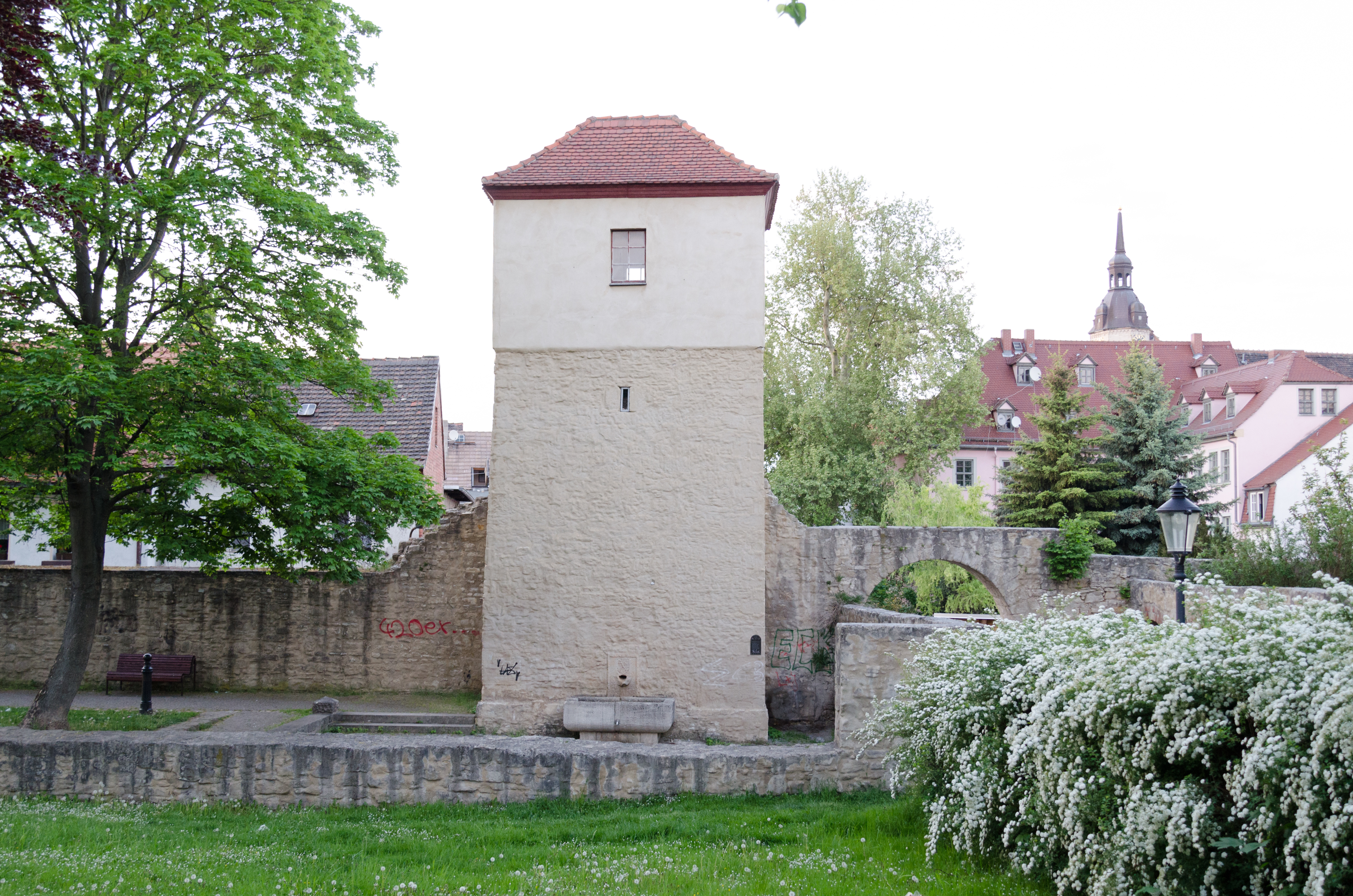 Naumburg, Stadtbefestigung, Wenzelsmauer